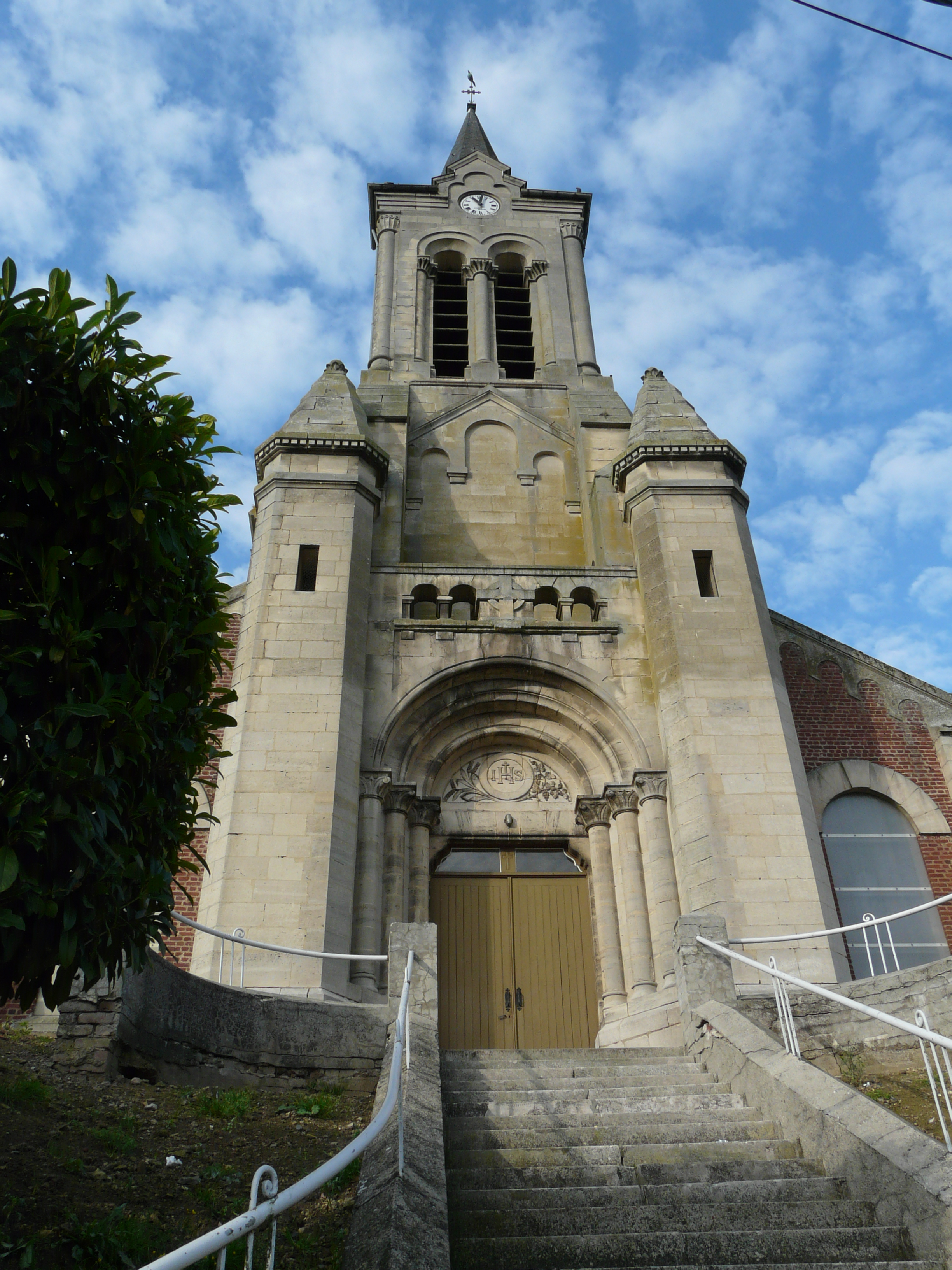 L'église de Banteux (Nord, France)